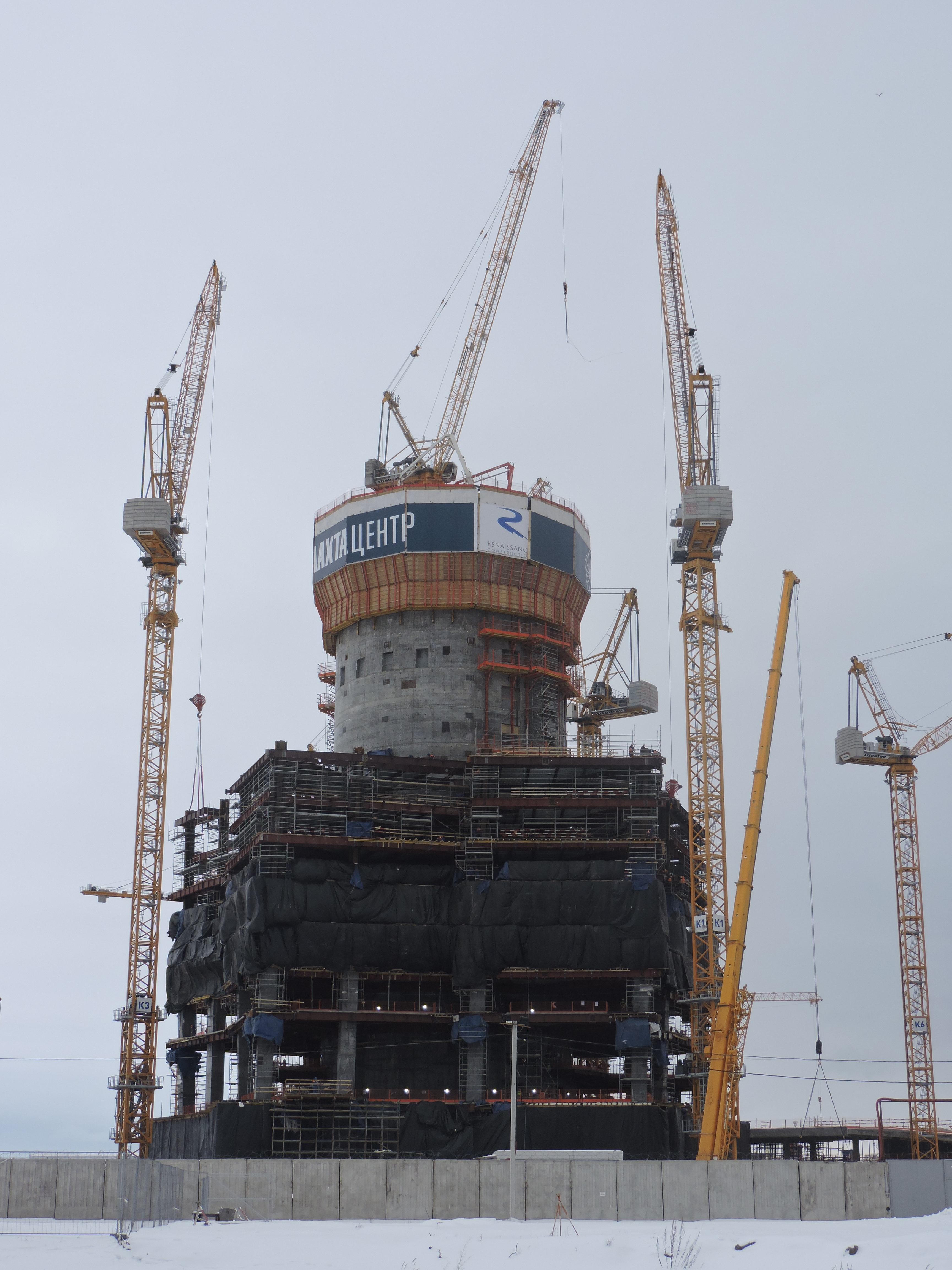 Лахта-центр в феврале 2016